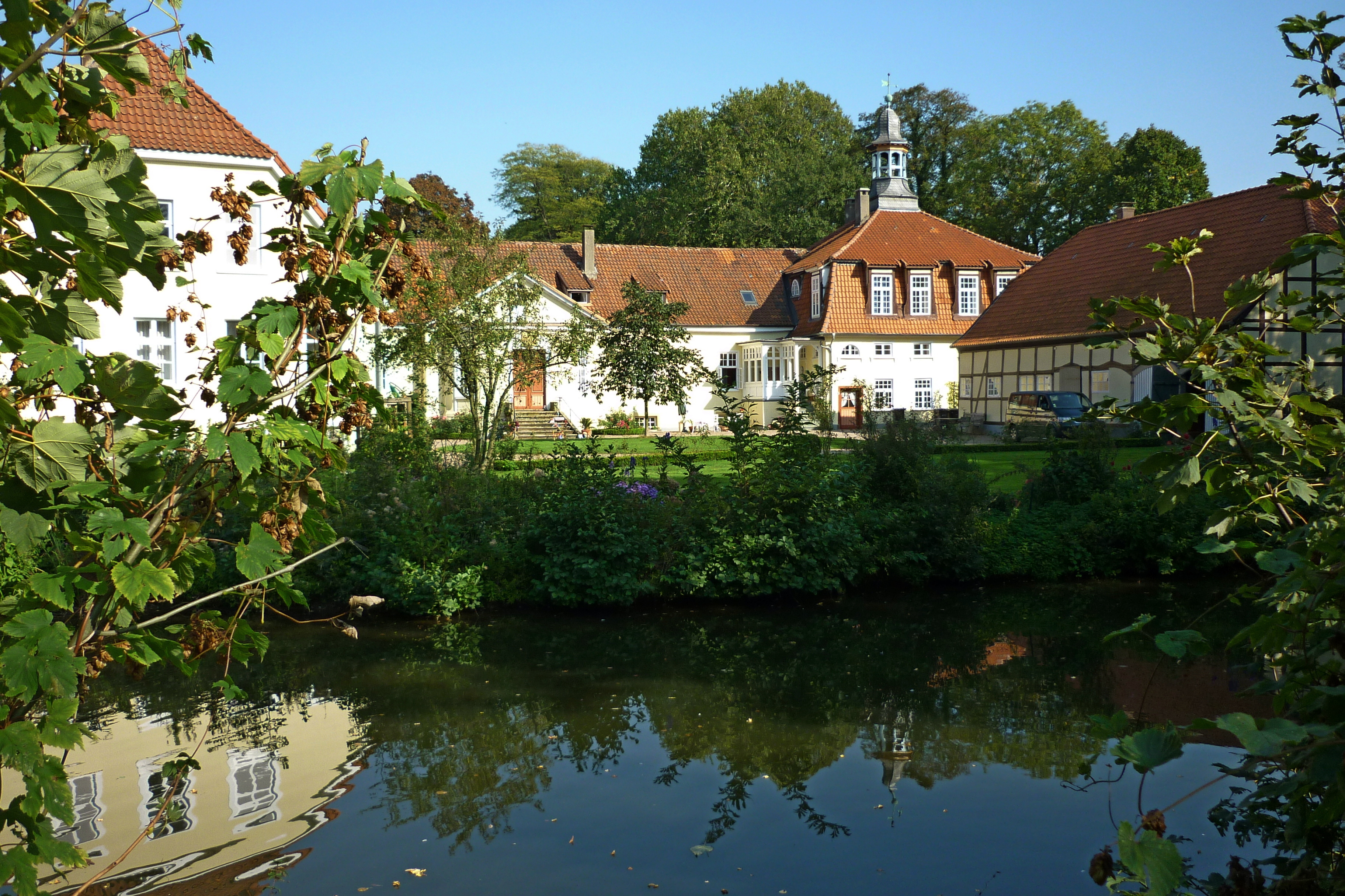 Leopoldshöhe (Kreis Lippe). Gut Eckendorf. This is the photograph of an architectural monument. It is part of the list of cultural monuments of Leopoldshöhe, no. 2